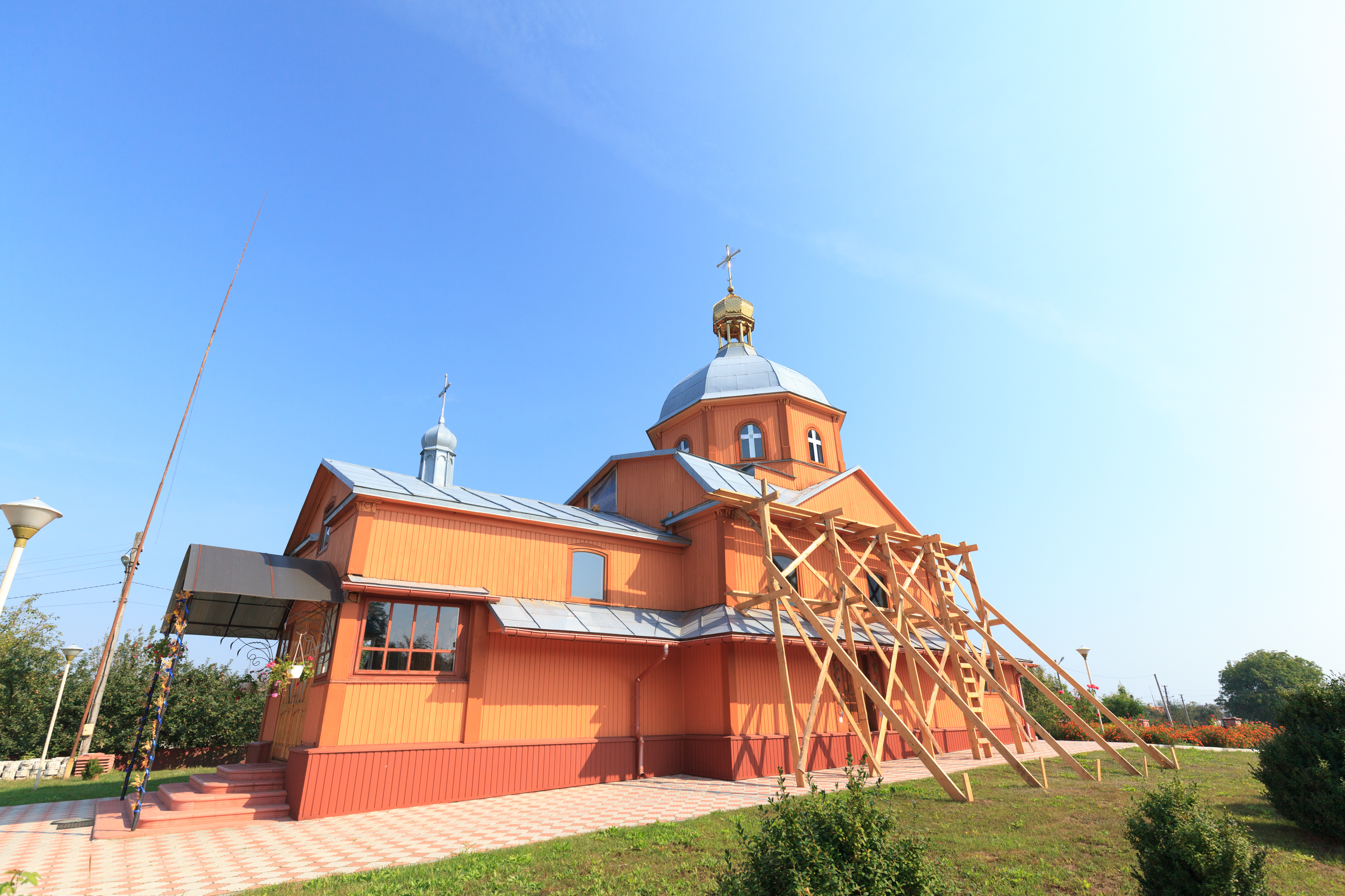 Церква Різдва Пресвятої Богородиці(дер.), с.Глиниці